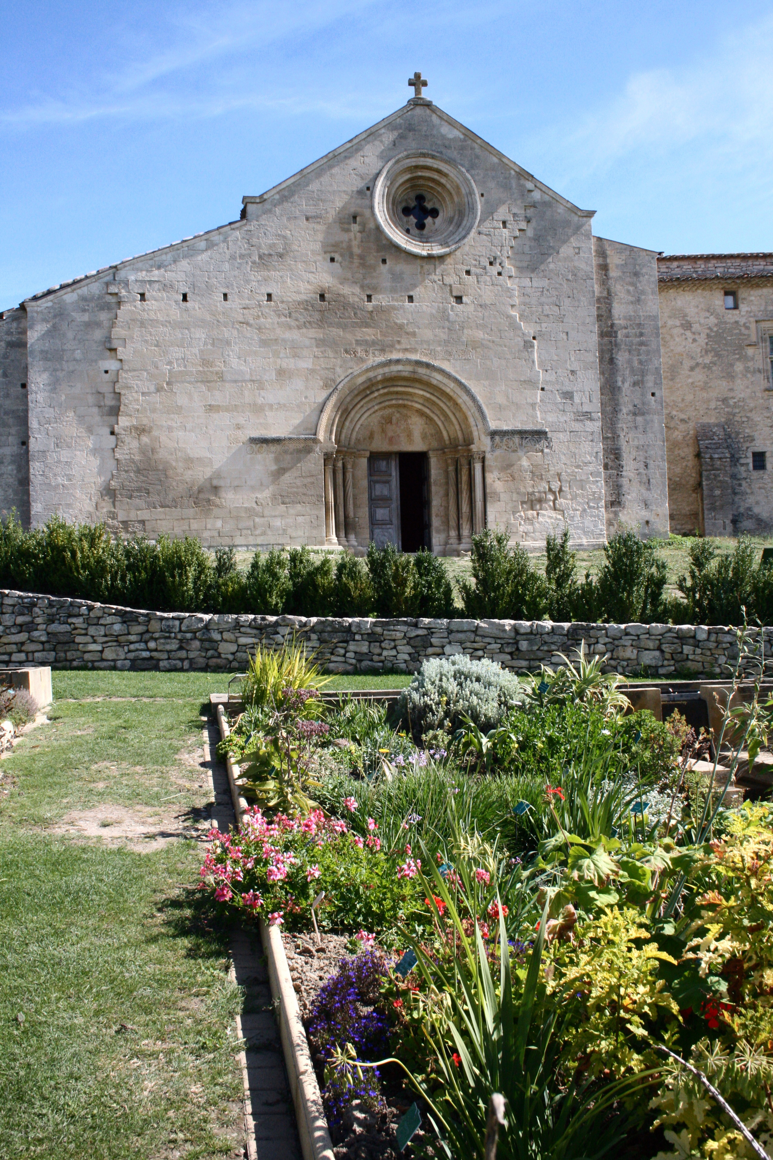 Prieuré de Salagon, département des Alpes de Haute-Provence, France. Eglise romane Notre-Dame (XIIe siècle) et jardin ethnobotanique